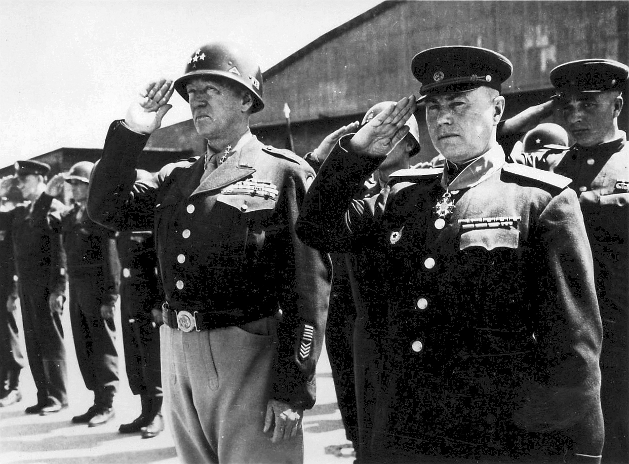 Командующий 4-й гвардейской армией генерал-лейтенант Никанор Дмитриевич Захватаев (1898—1963) с американским генералом Джорджем Паттоном (George Smith Patton, Jr, 1885—1945) после награждения орденом «Легион почета» (Legion of Merit)